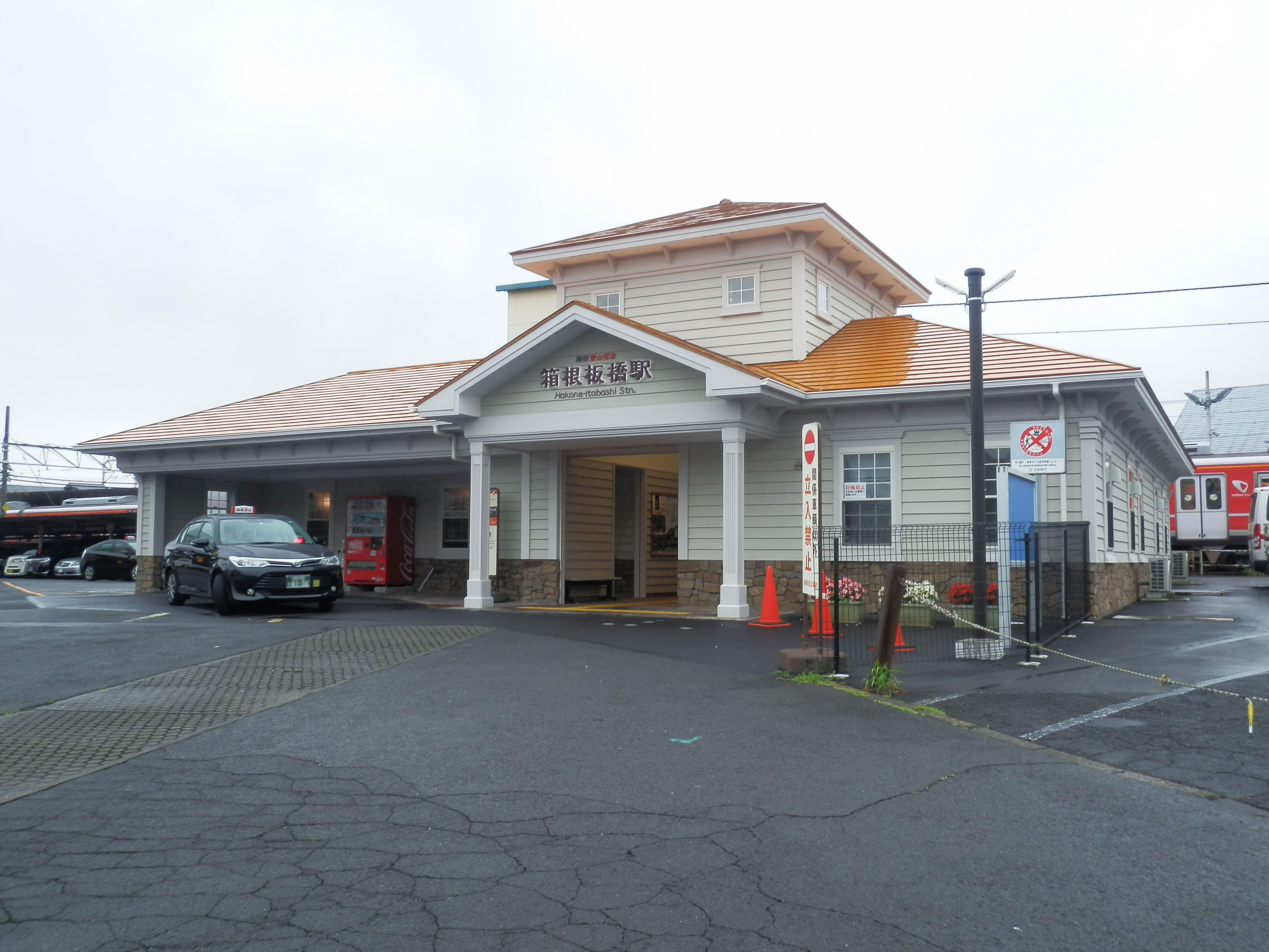 箱根板橋駅駅舎